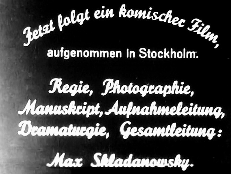 Vorspann zum Stummfilm: Komische Begegnungen im Tiergarten zu Stockholm